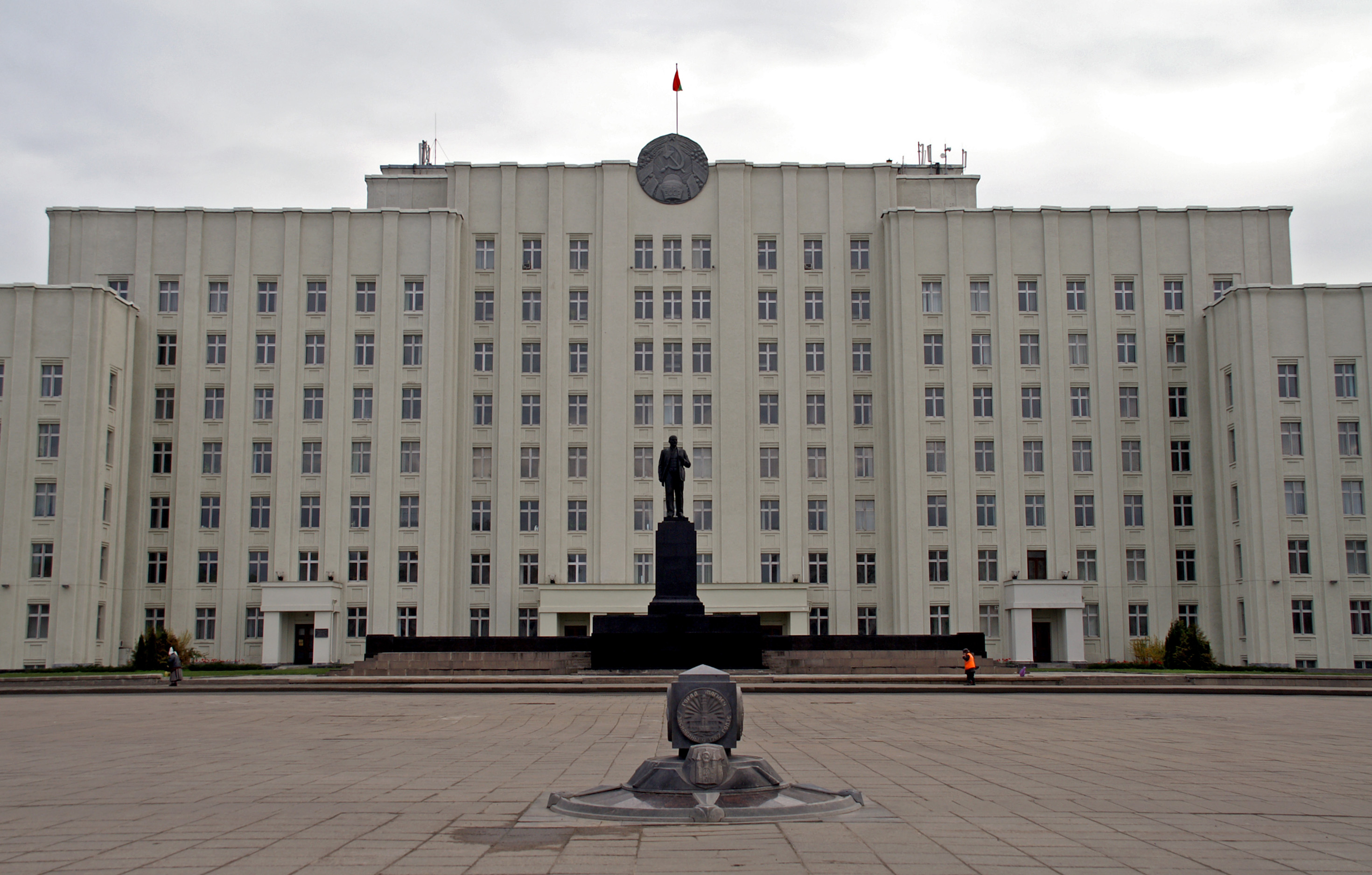 Беларуская (тарашкевіца): Ансамбль плошчы Леніна: Дом Саветаў адміністрацыйны будынак жылыя дамыпомнік У.І. Леніну. г. Магілёў This is a photo of Belarusian heritage monument. Reference number: 513Г000039 ( WLM)